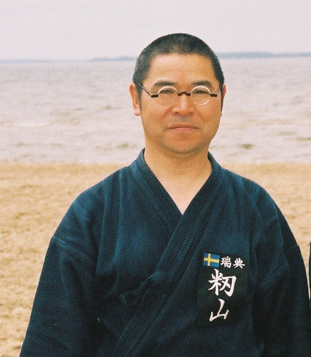 Momiyama-sensei Yyterin rannalla kataharjoituksessa Pori-Jazz kendoleirillä 2004